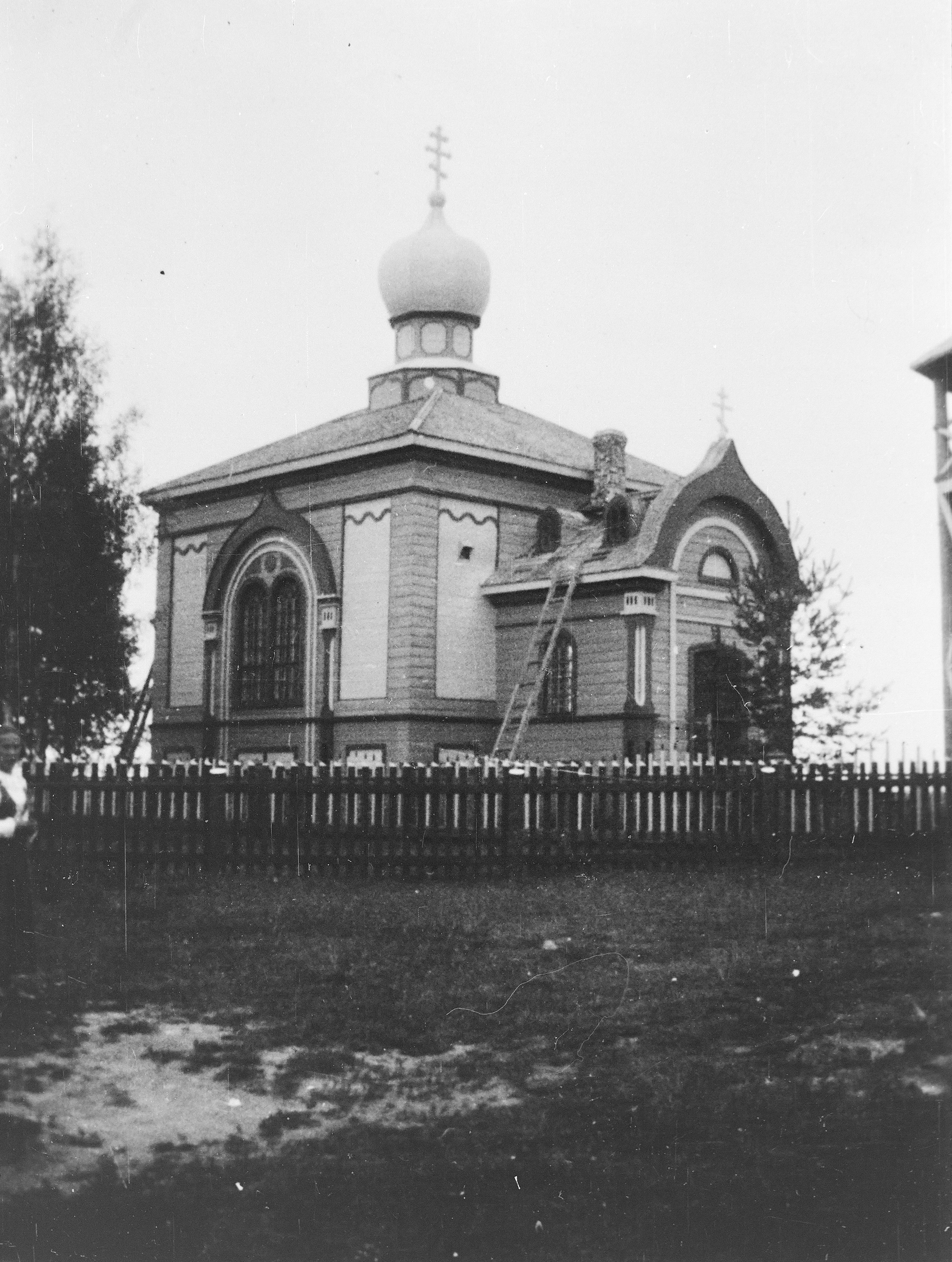 Vuonna 1887 valmistunut Annantehtaan ortodoksinen kirkko Karatsalmella Suojärvellä.